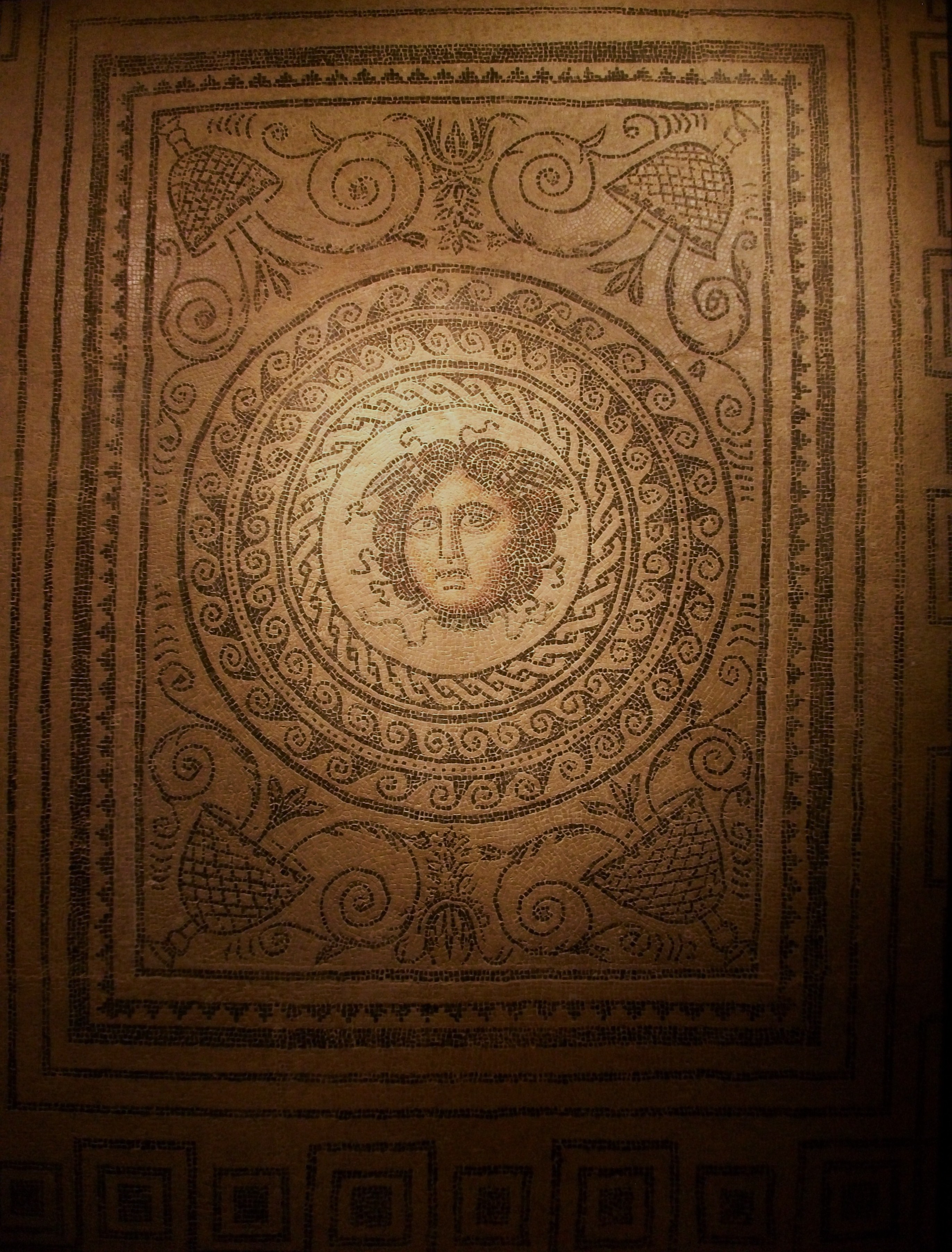 Mosaic de la Medusa, Museu d'Història de València. Segle II-III dC. Opus tessellatum. Trobat al carrer de Rellotge Vell de València.